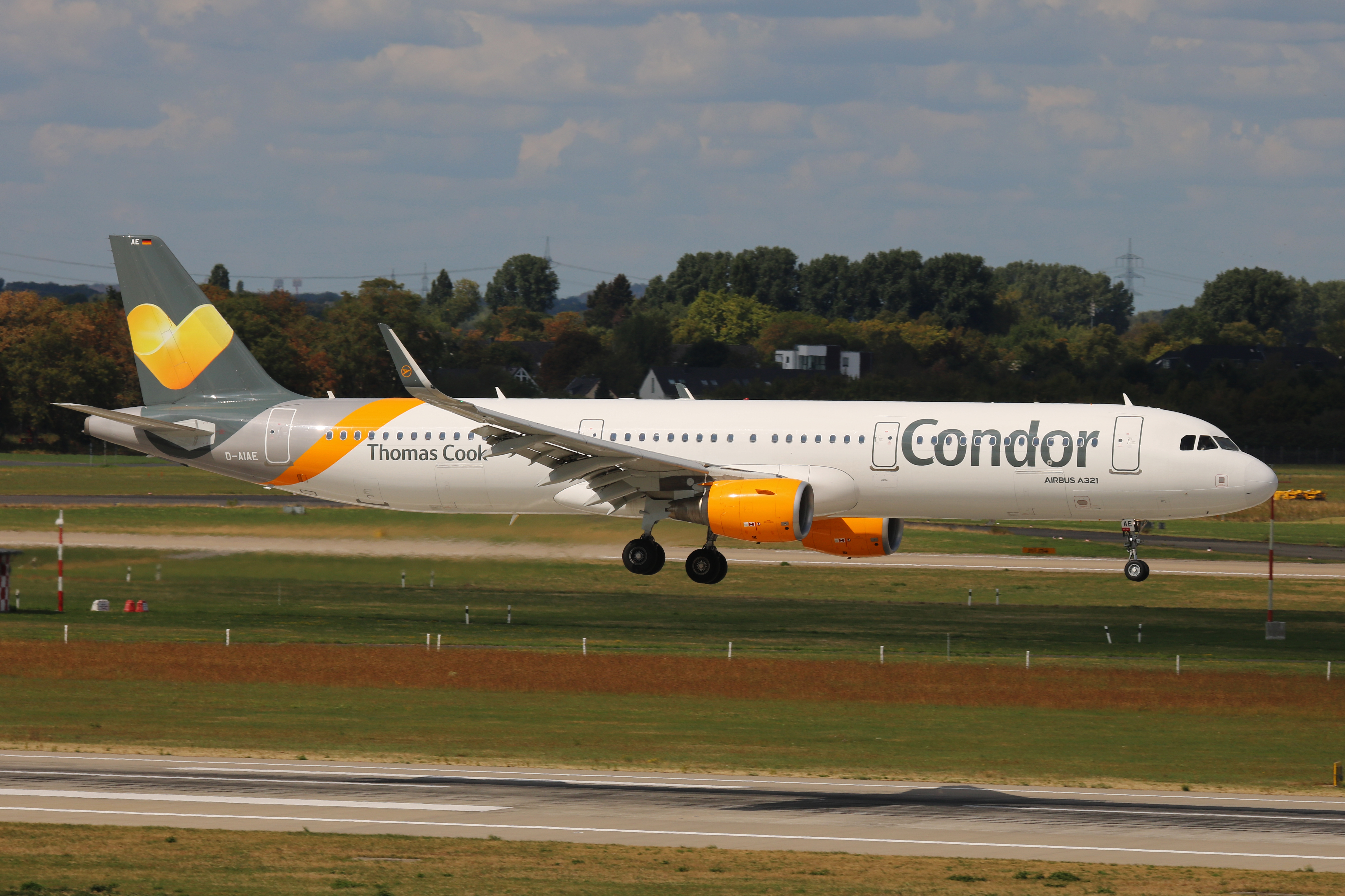 Flughafen Düsseldorf, Airbus A321-200 (D-AIAE) der Condor Flugdienst